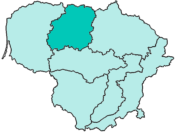 Mappa della diocesi cattolica di Šiauliai, in Lituania.